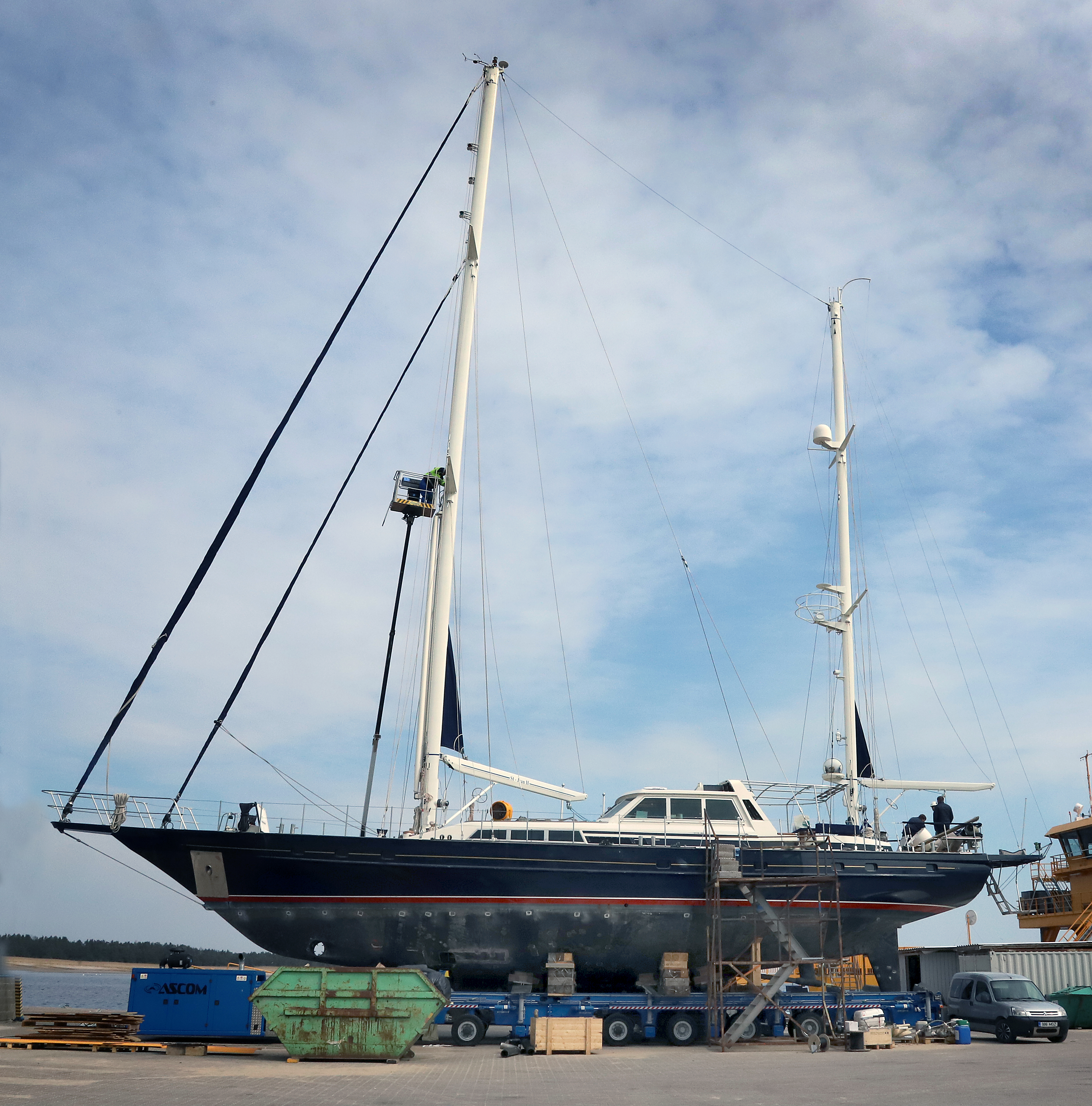 Antarktika-ekspeditsiooni purjekas Admiral Bellingshausen remondis Nasval 22.04.19